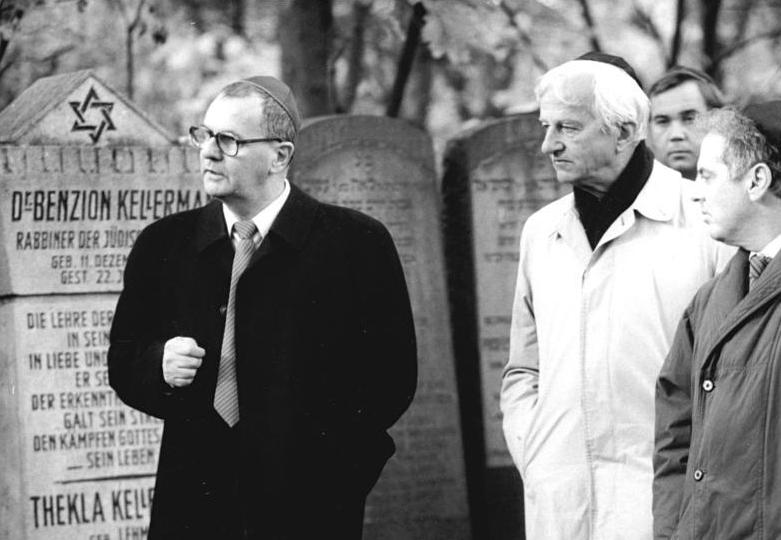 ADN-Peer Grimm 31.10.90 Berlin: Weizäcker-Besuch Den jüdischen Grabstätten ist das deutsche Volk verpflichtet. Das erklärte Bundespräsident Richard von Weizäcker bei einem Besuch des jüdischen Friedhofs in Berlin-Weißensee. (v.l.n.r.: Dr. Peter Kirchner, Vorsitzender der Jüdischen Gemeinde zu Berlin (Ost), Richard von Weizäcker, Dirigent Daniel Barenboim)